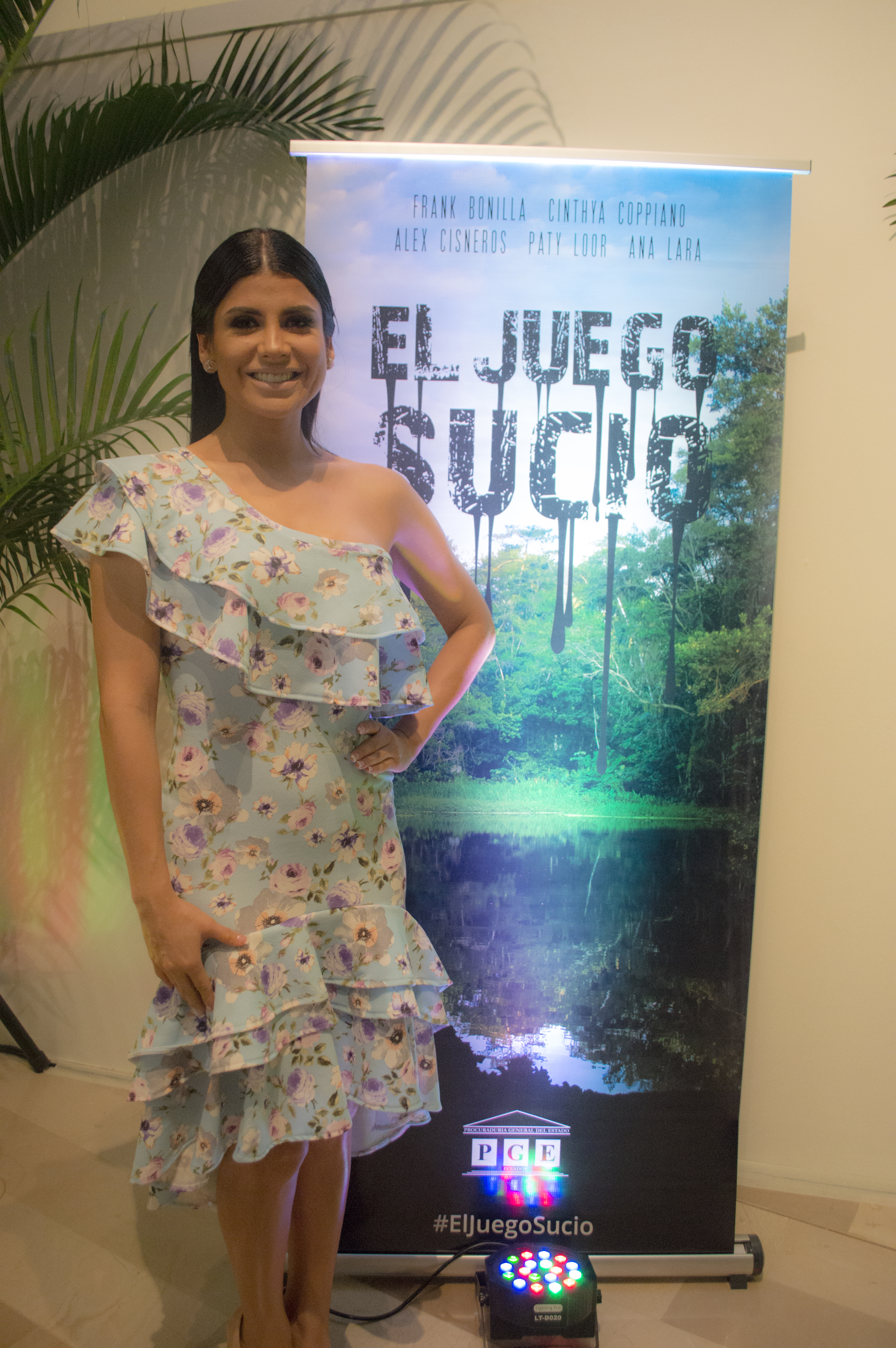 Cinthya Coppiano, presentadora y actriz ecuatoriana posando a lado del baner de la película El Juego Sucio, la cual protagonizó.